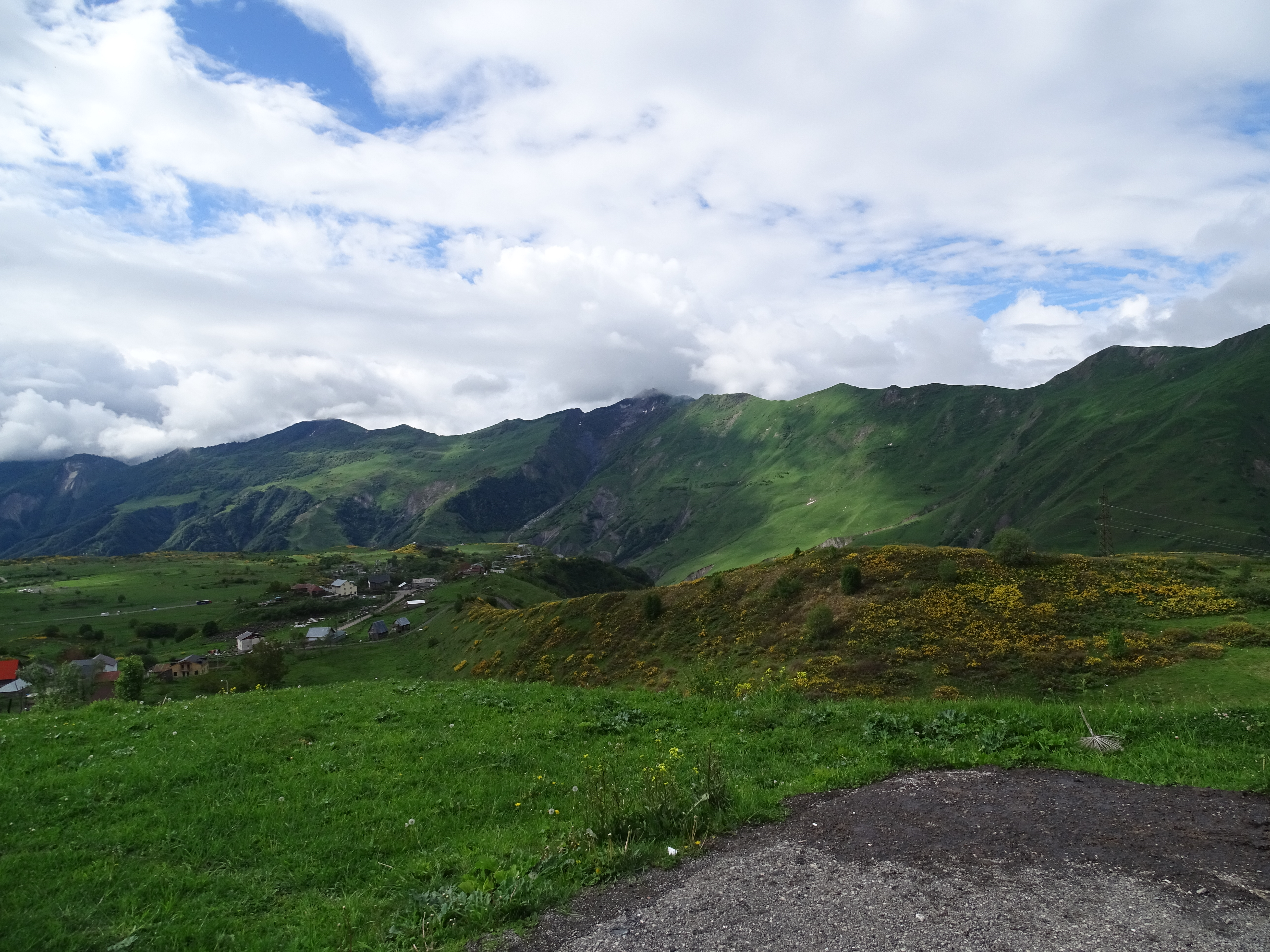 Landschaftsaufnahme